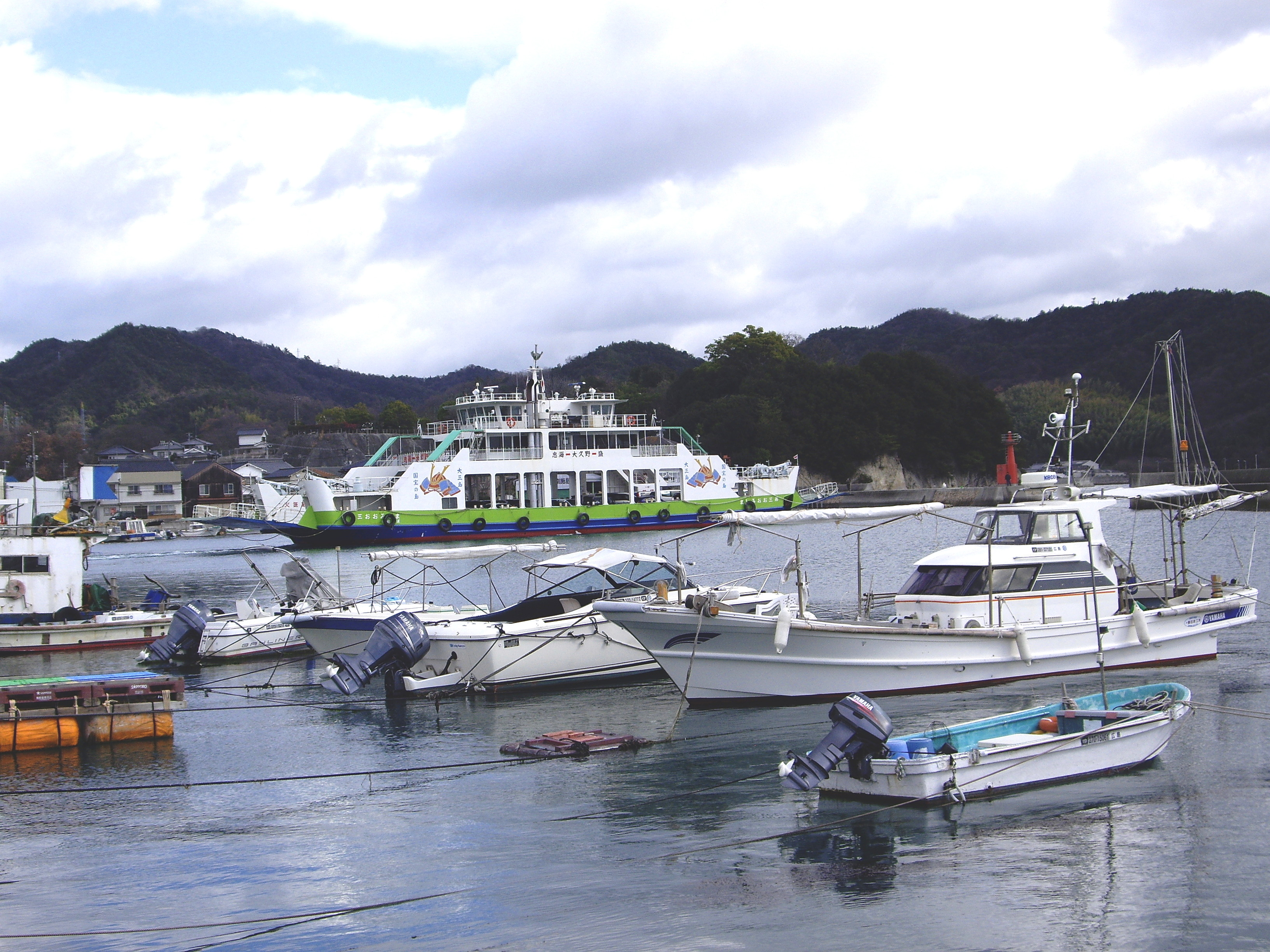 忠海港